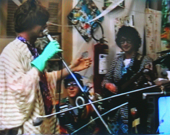 Performance da Banda Aristóteles de Ananias Jr na Casa de Cultura Mario Quintana, 1992. Na imagem Ricardo Frantz, Diego Silveira e Marcelo Birck